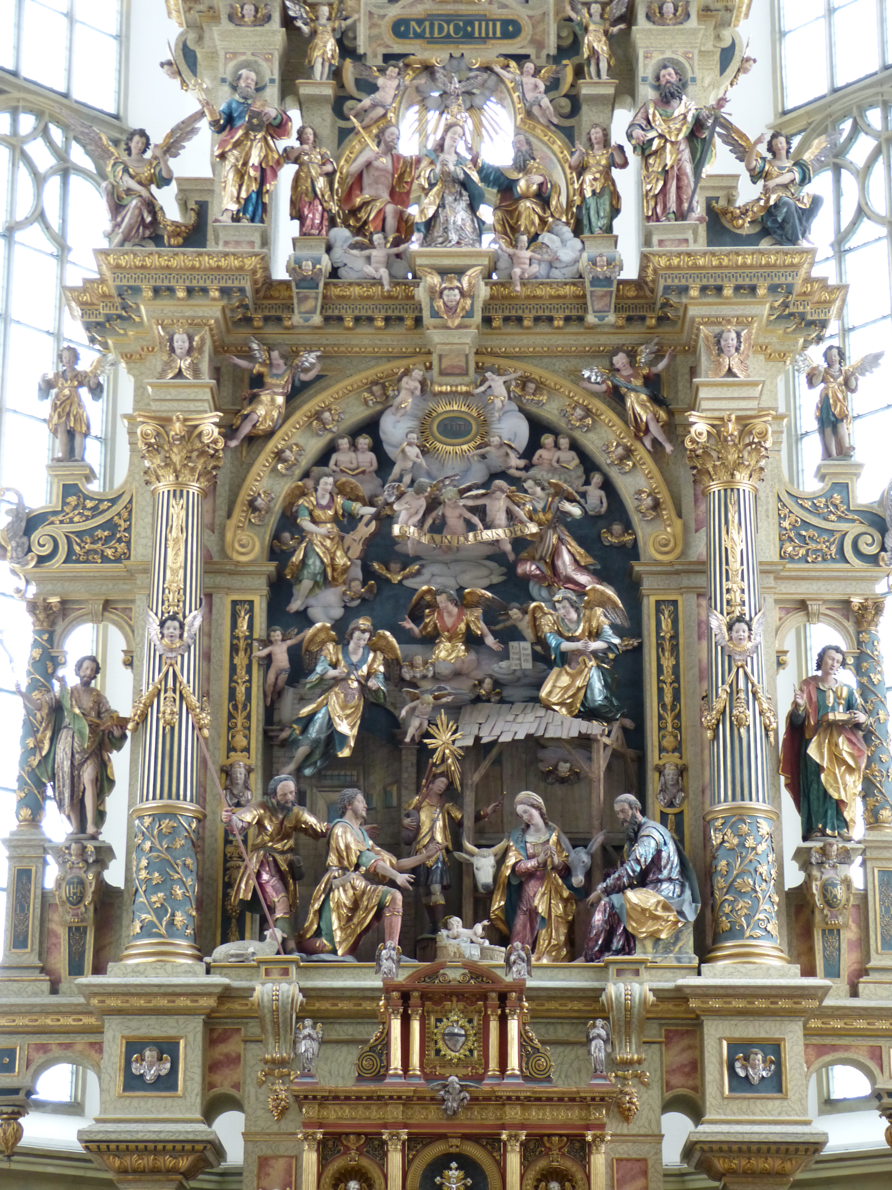 St. Ulrich und Afra, Augsburg, Bayern